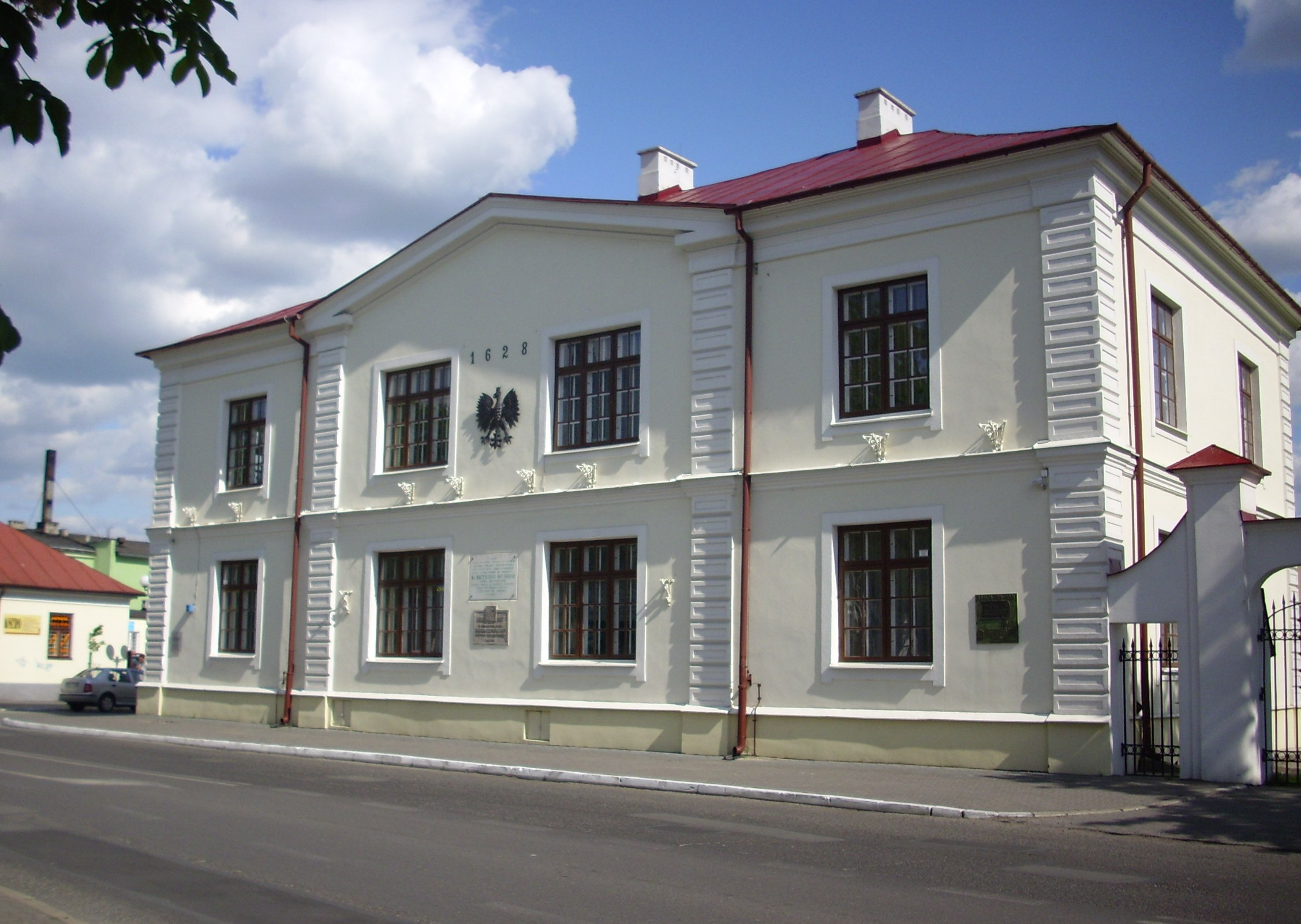 Biała Podlaska. Budynek dawnej Akademii Bialskiej, obecnie I Liceum Ogólnokształcące im. Józefa Ignacego Kraszewskiego.